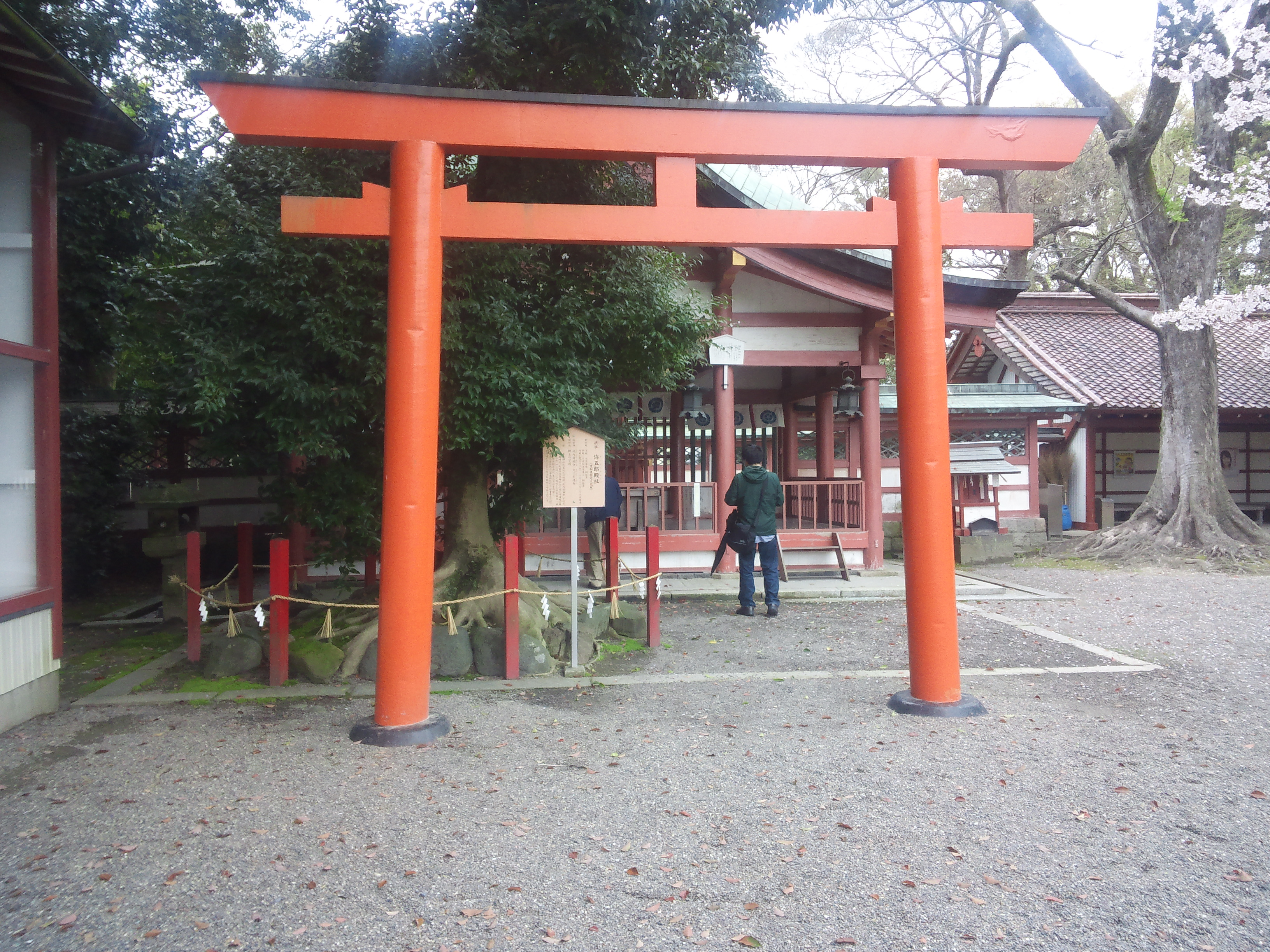 津島神社 - 弥五郎殿社